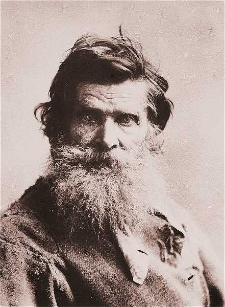 Powstaniec 1863 r. Po powrocie z Syberii